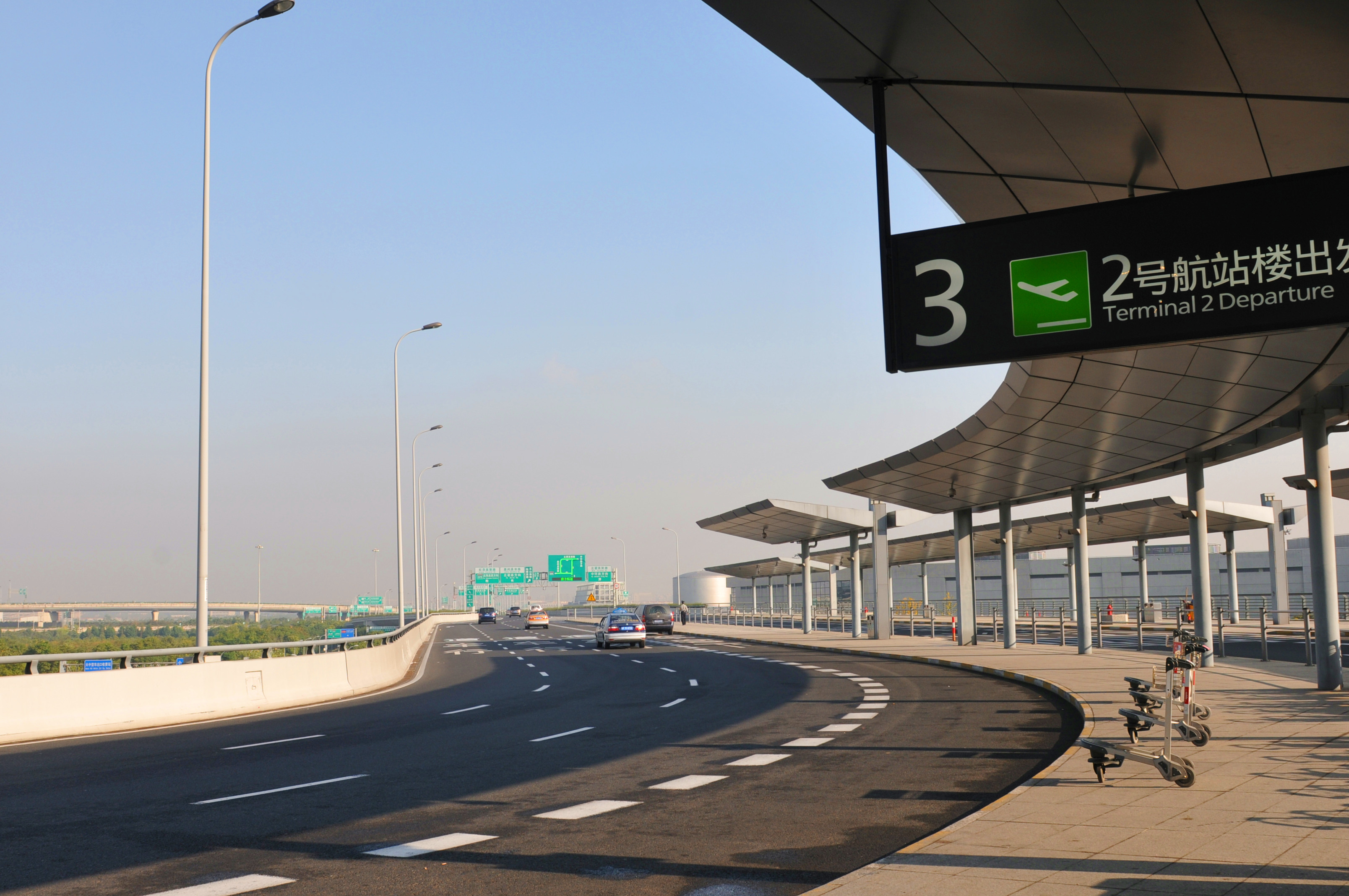 Minhang, Shanghai, China